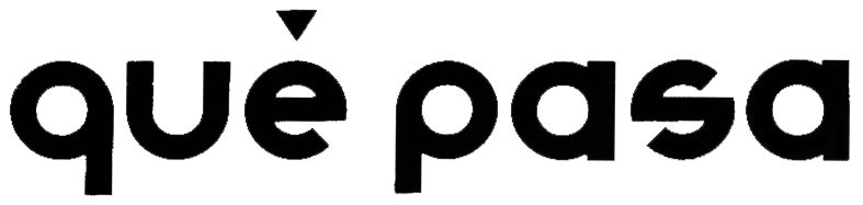 Primer logo de la revista chilena Qué Pasa